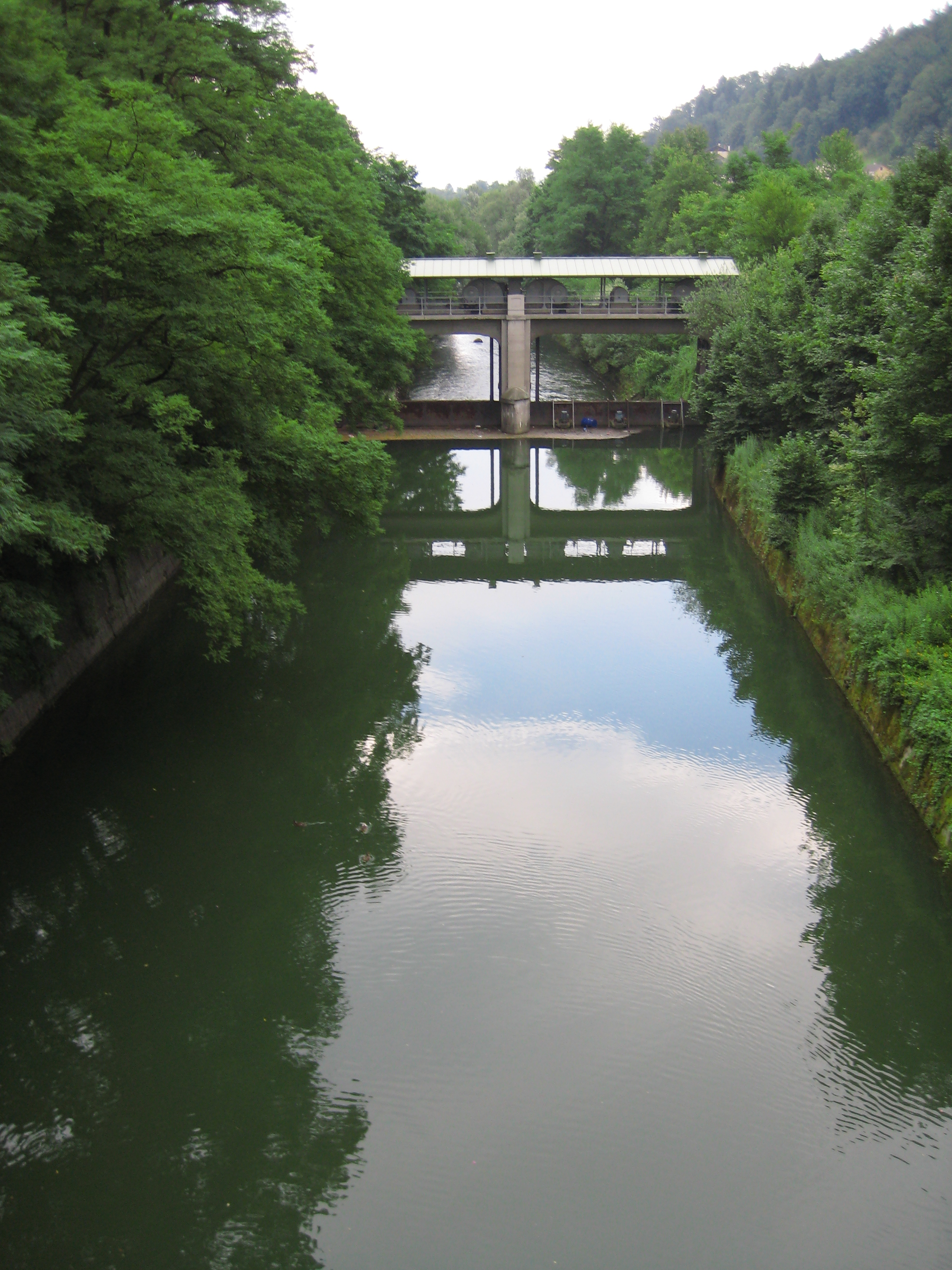 Gruberjev prekop